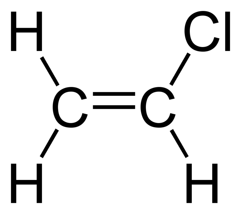 Vinilxlorid